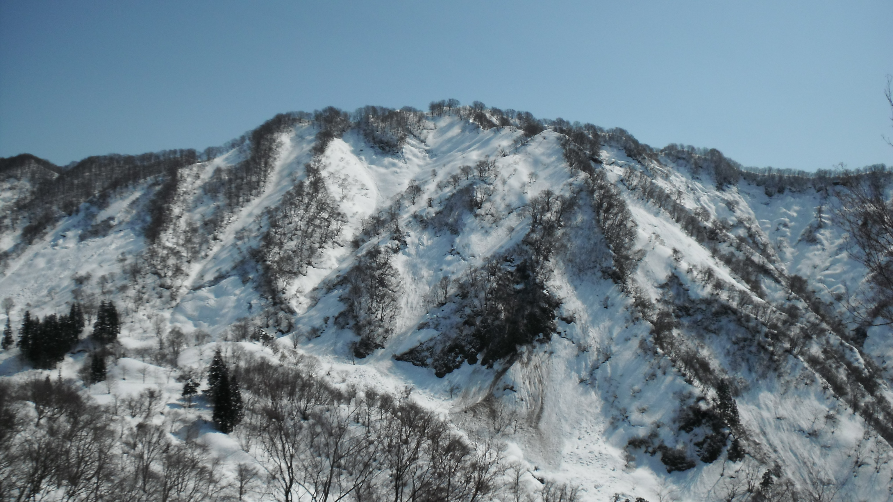 西側から望む鋸山